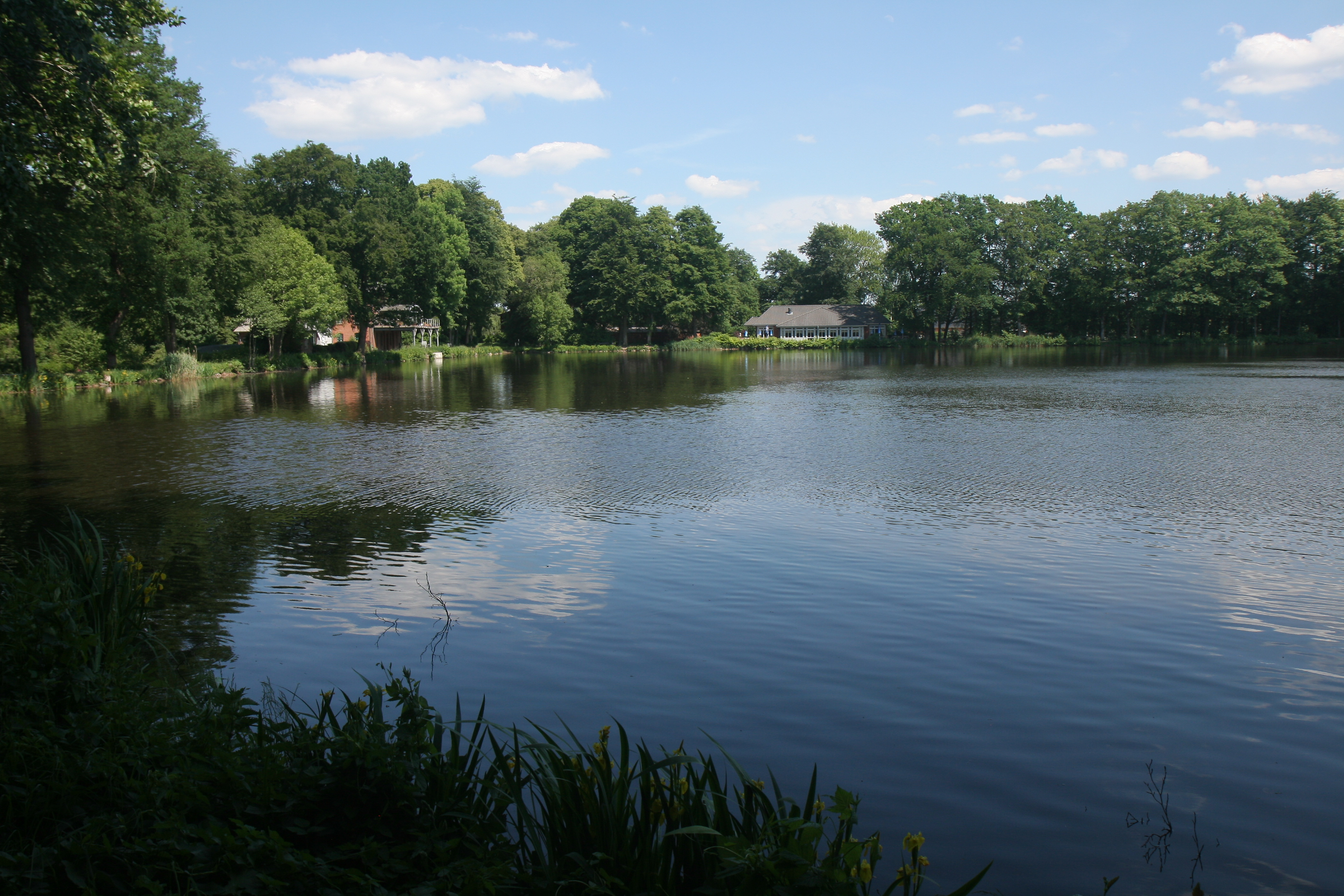 Mühlenteich mit Alter Mühle (links) und Restaurant-Café Seeterrassen (Bildmitte) in Weddelbrook.